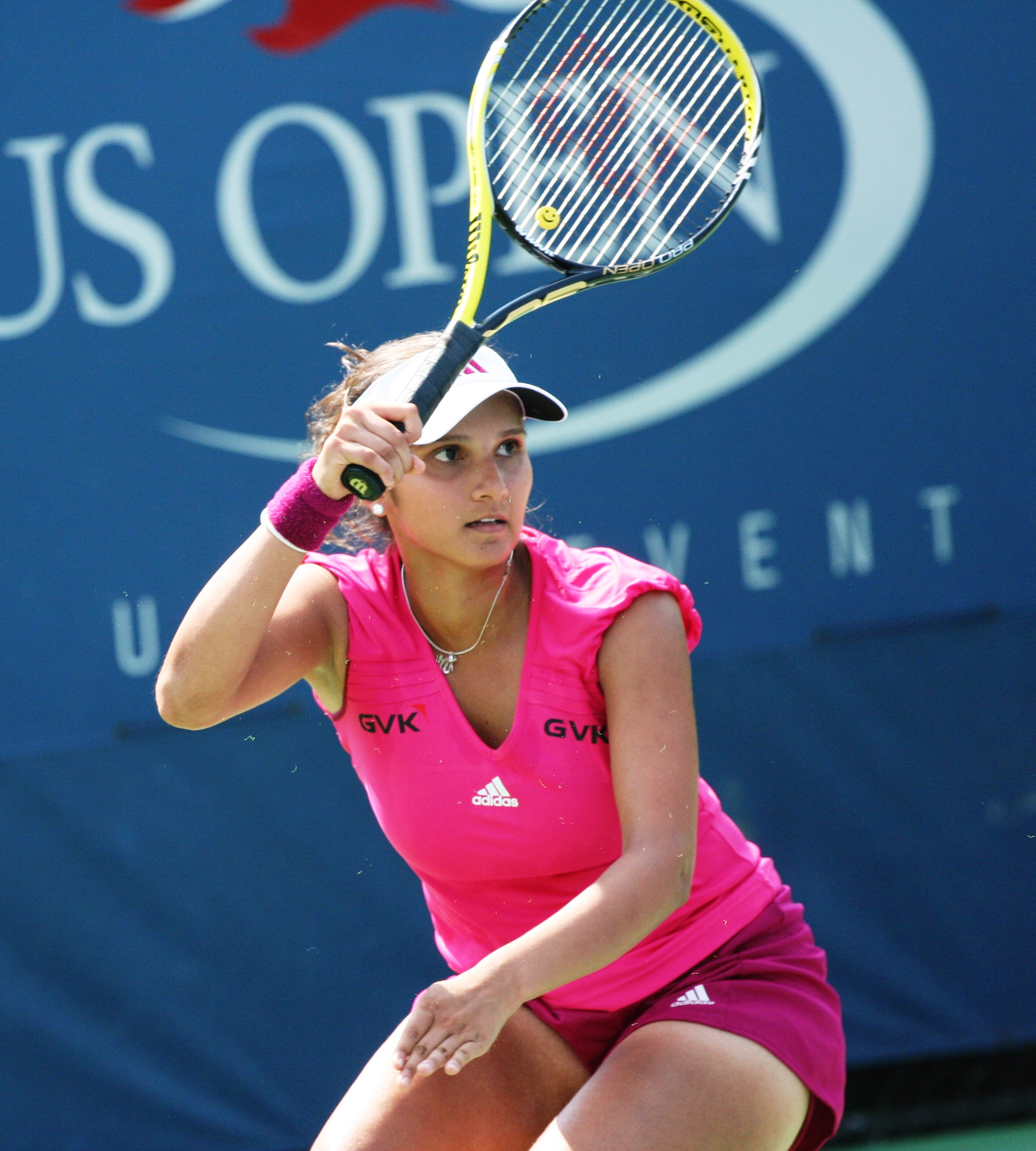 U.S. Open Wednesday, Sept. 1, 2010